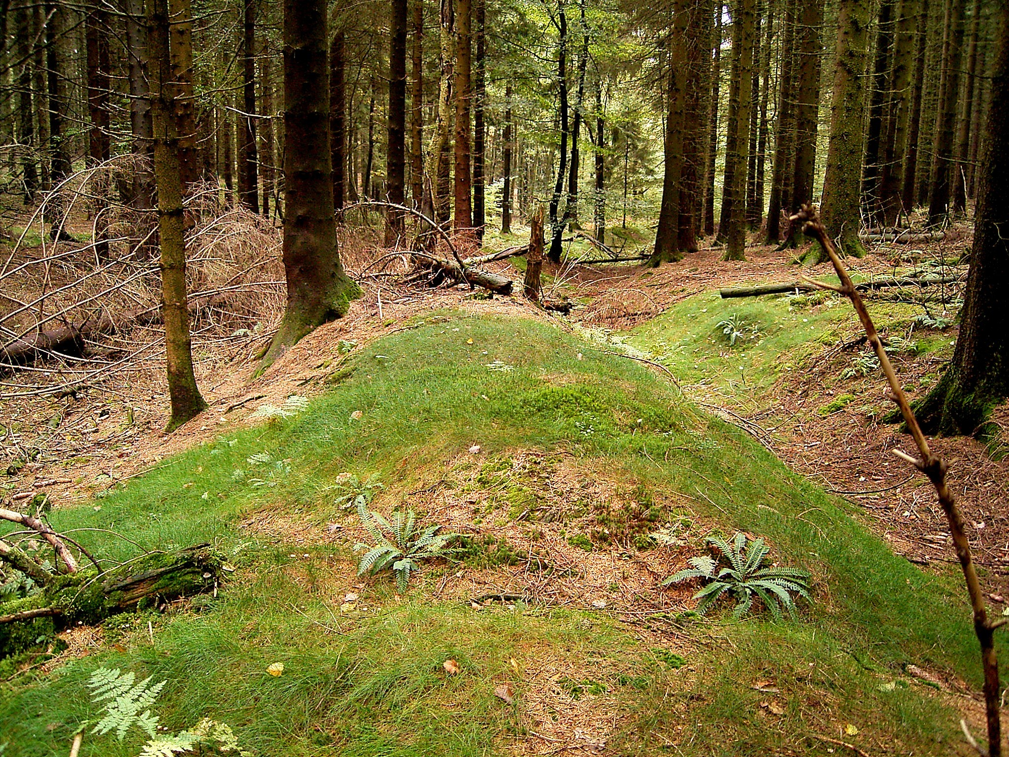 Radevormwald